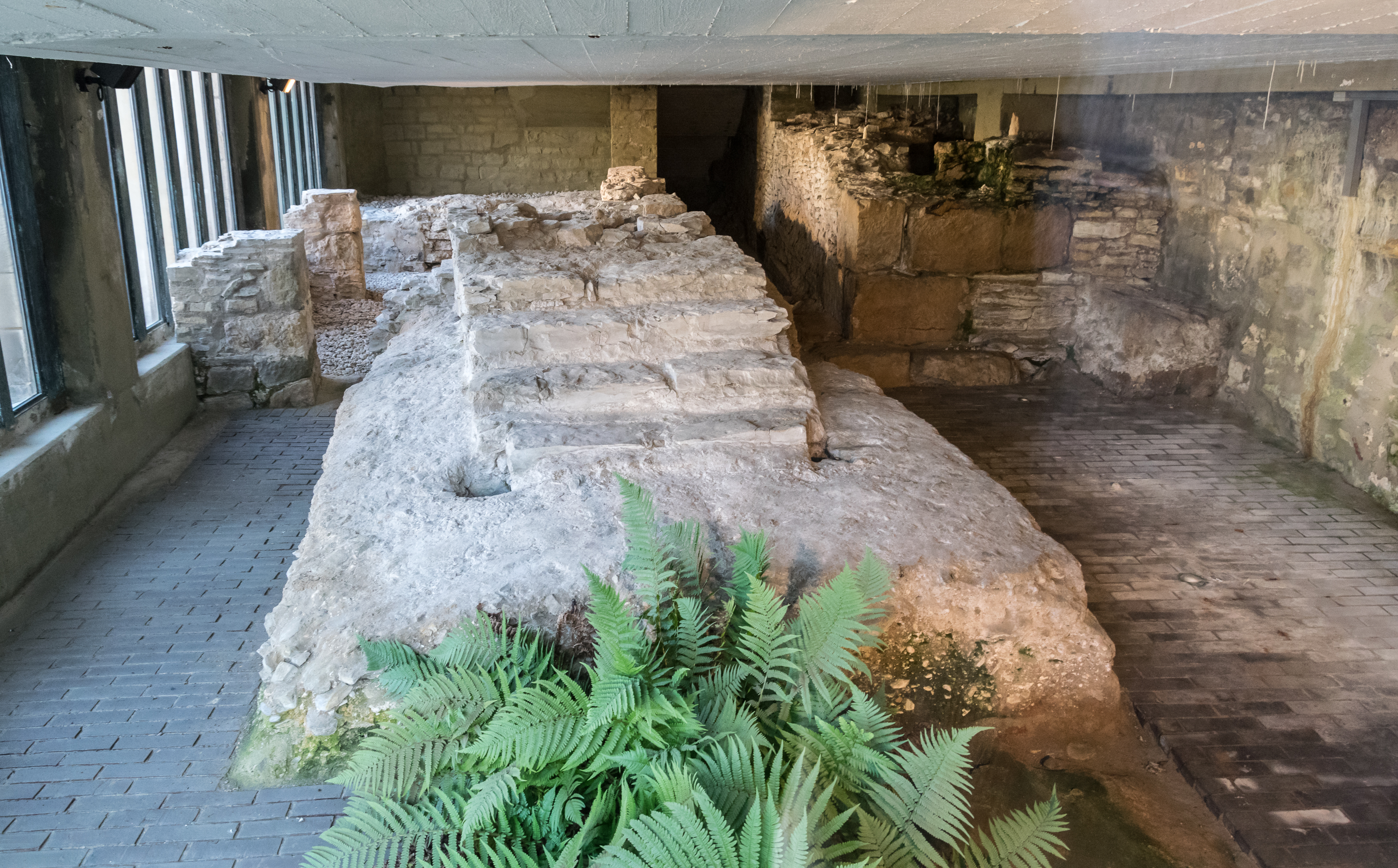 Ausgrabung Kaiserpfalz am Paderborner Dom